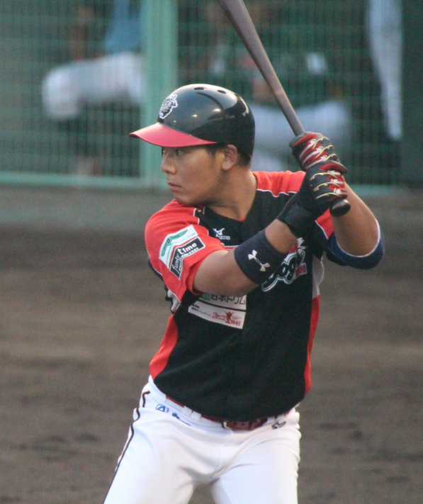 2013.高知球場